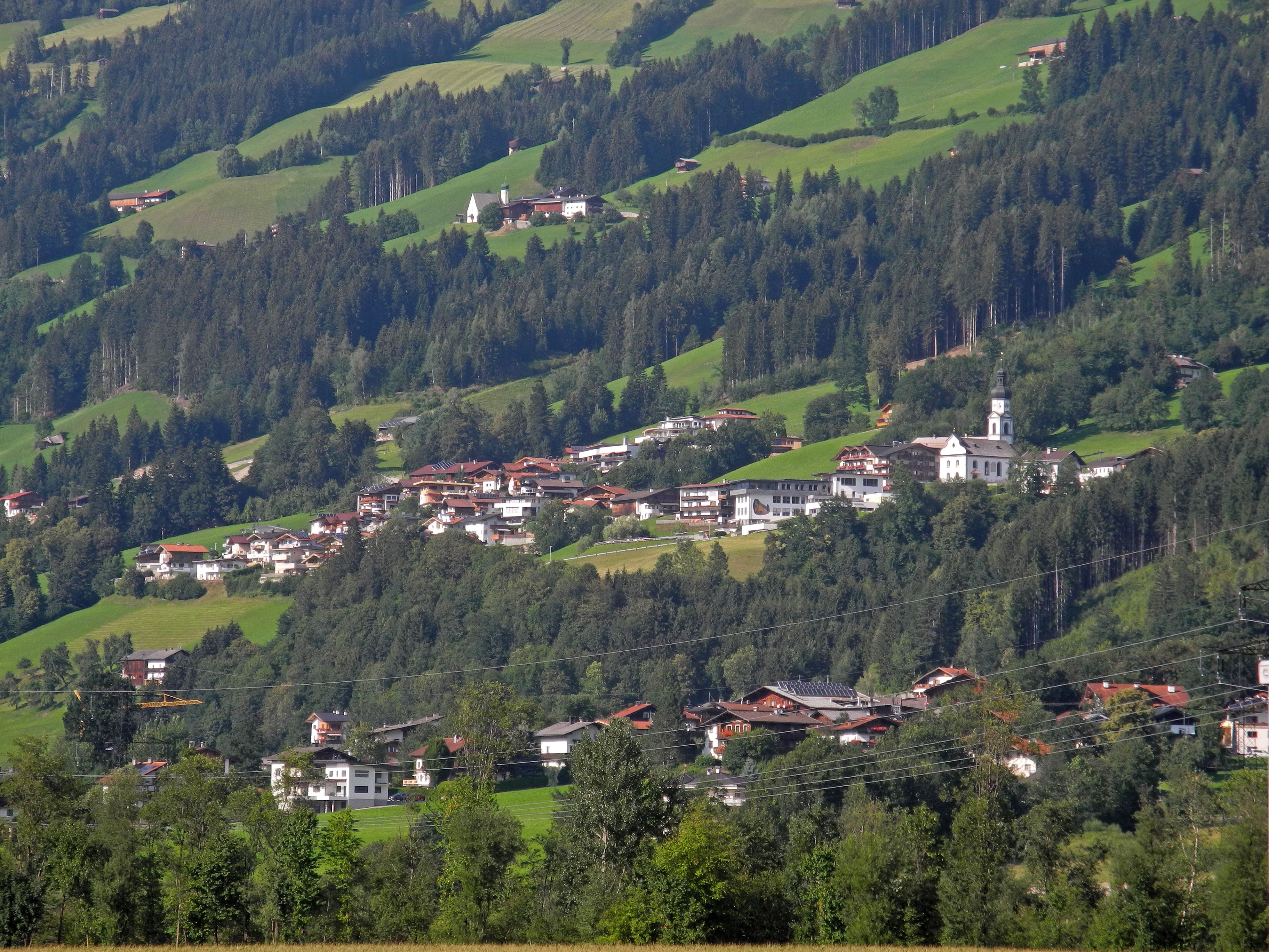 Blick auf die Pfarrkirche hl. Bartholomäus und die Wallfahrtskirche Mariä Reinigung in Hart im Zillertal